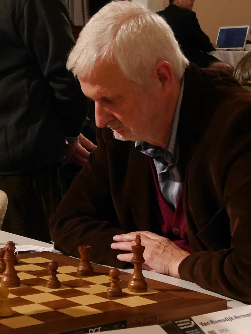 Herman van Riemsdijk, Schachweltmeisterschaft der Senioren 2016 in Marienbad.